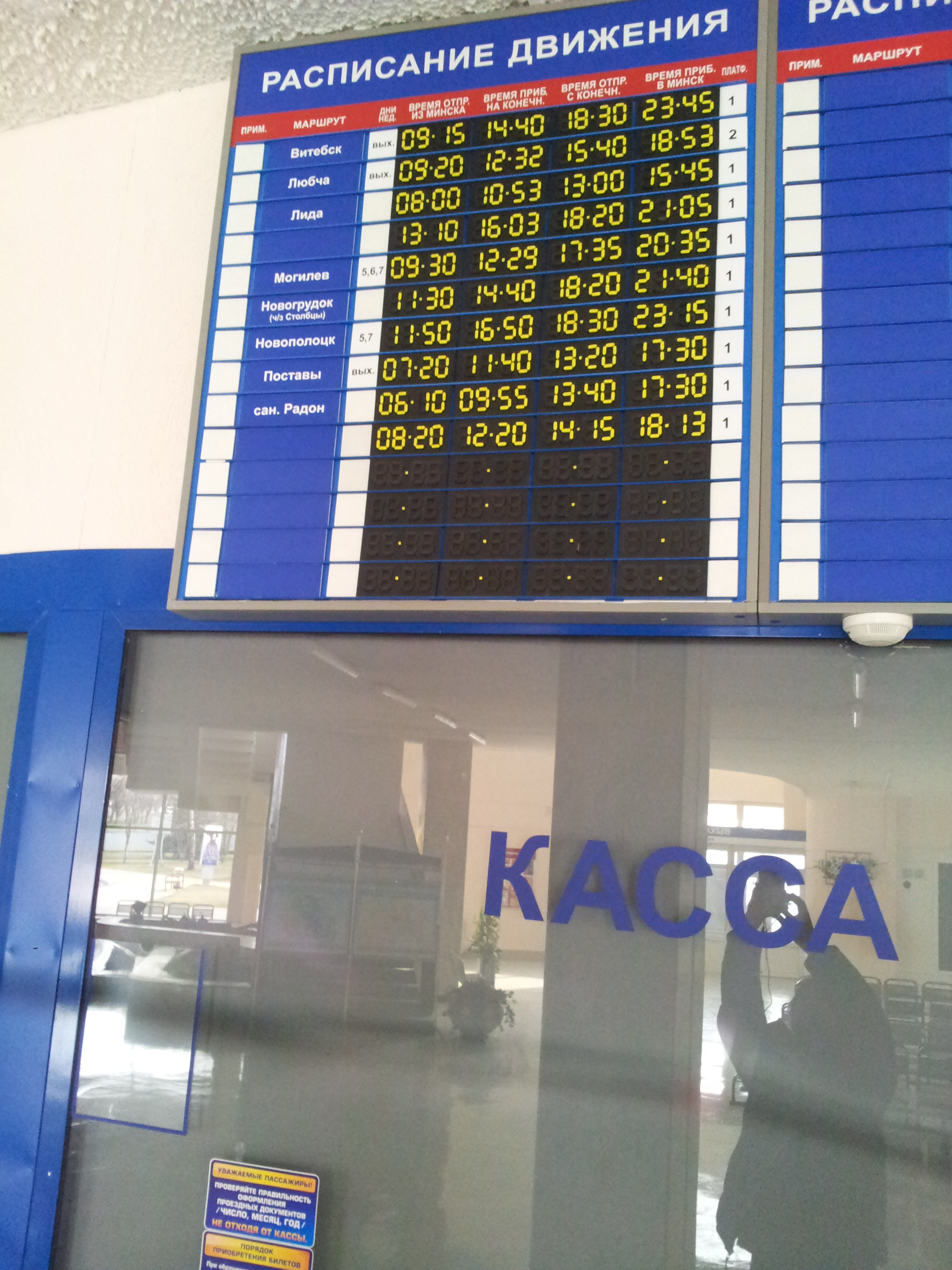 Расписание на автовокзале Минск-Восточный